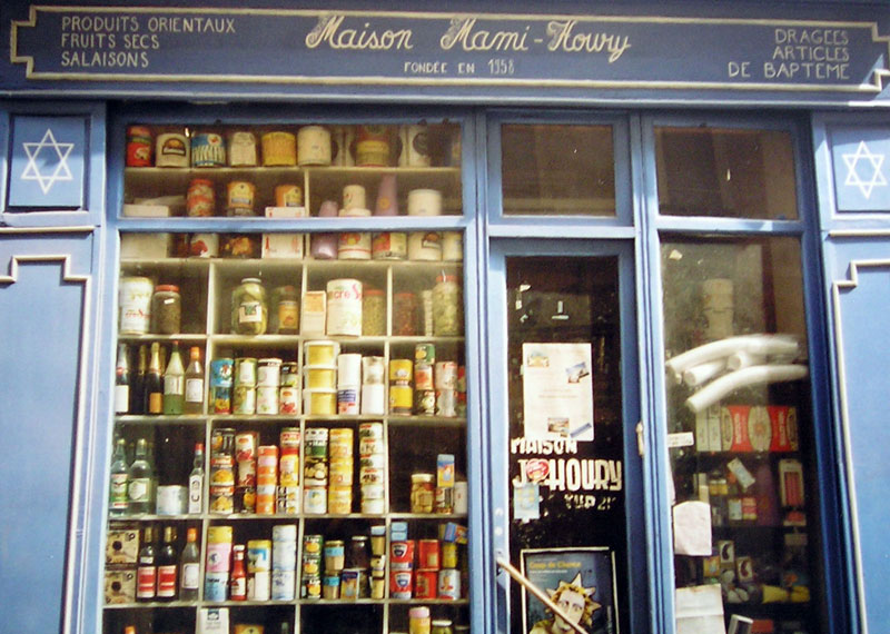 Paris (Île-de-France, France) : "Maison Mami-Houry", épicerie juive dans le Le Marais.